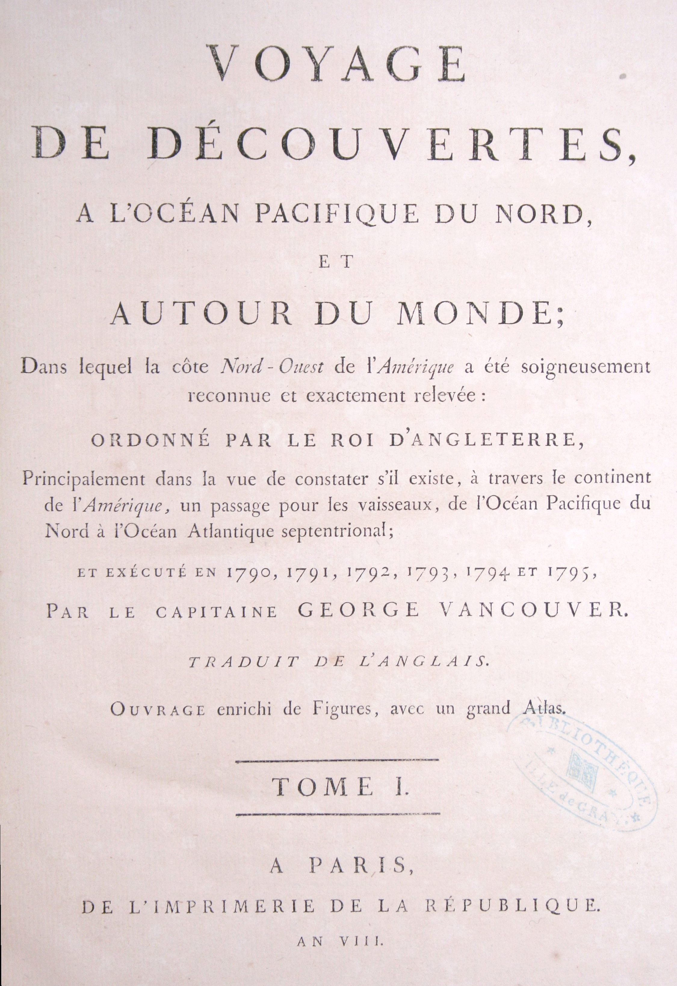 scam de la page de titre du voyage de George Vancouver exemplaire de la bibliothèque patrimoniale de Gray (France)